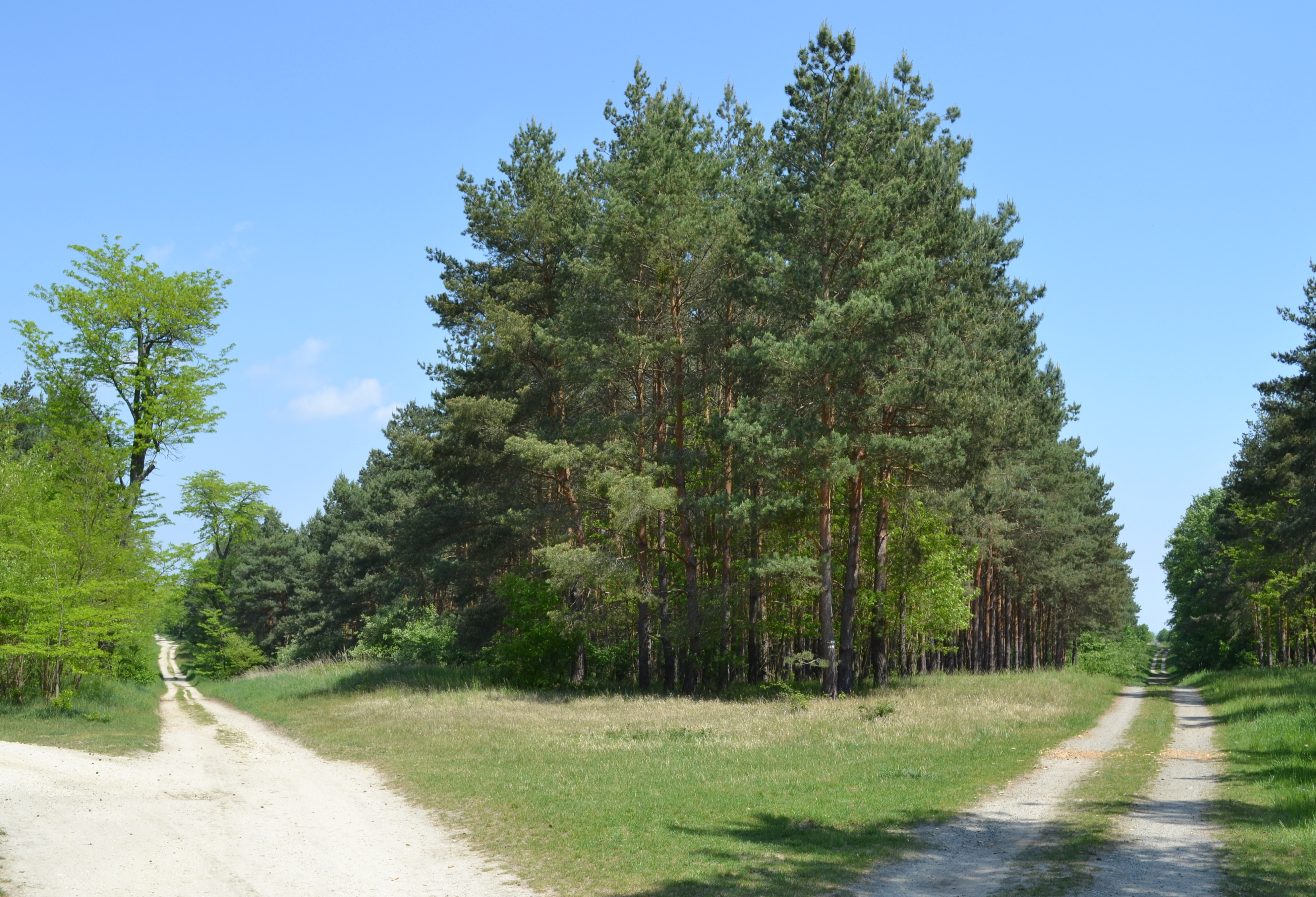 Lednicko-valtický areál - Boří les